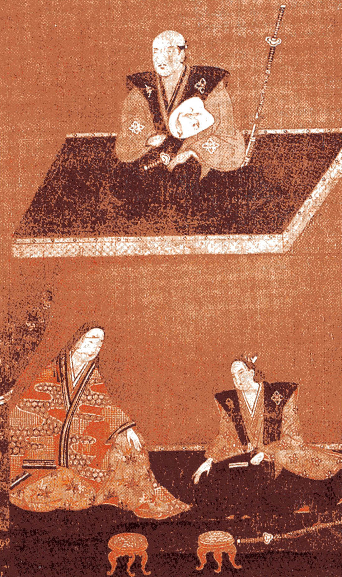 武田勝頼、夫人、信勝画像